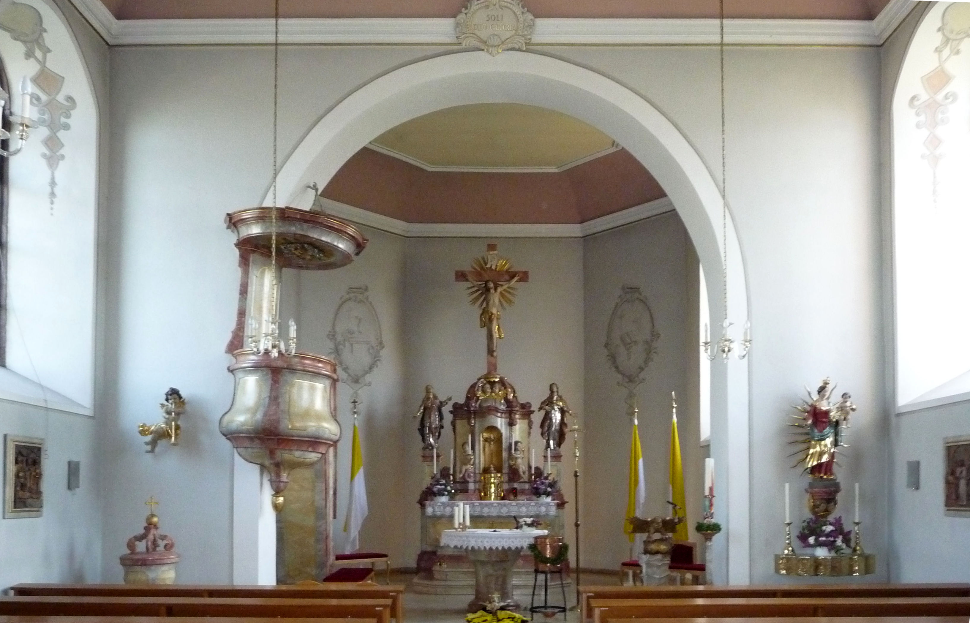 St Cyriakuskirche in Ludwigshafen-Ruchheim